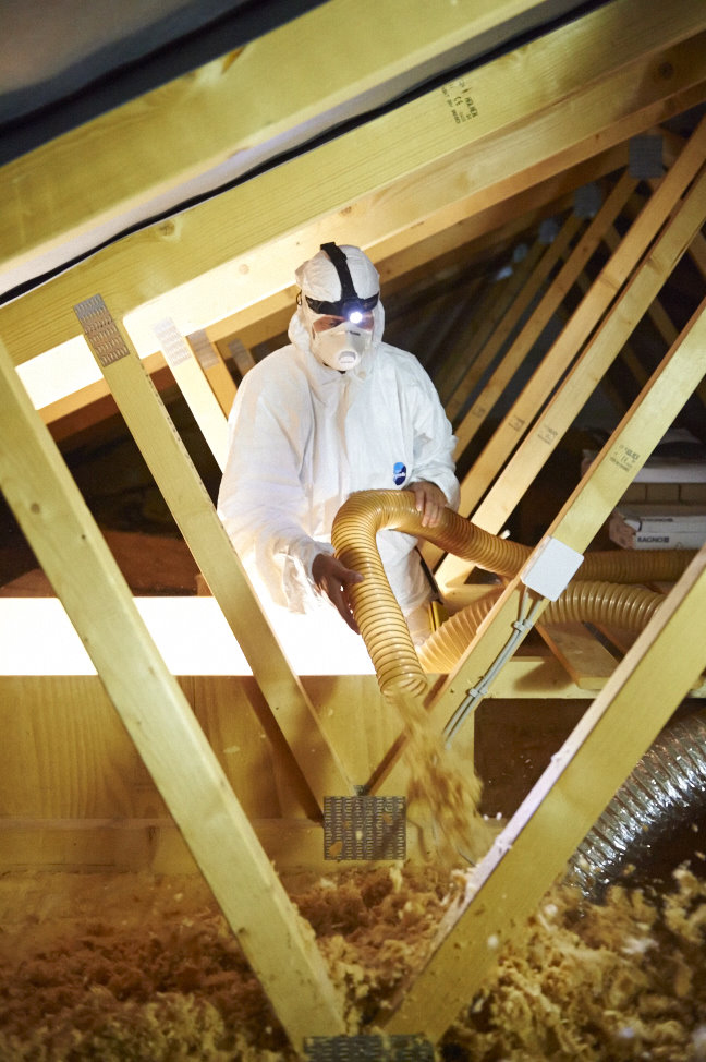 Loftet i et nybygget hus isoleres med glasuld i granulatform.